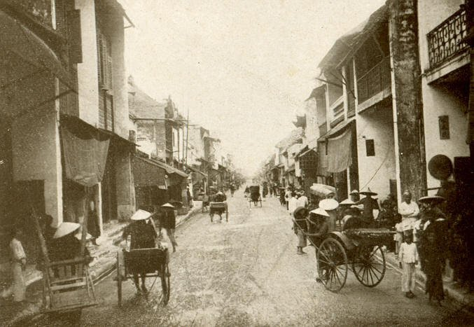 Phố cổ Thành Nam xưa